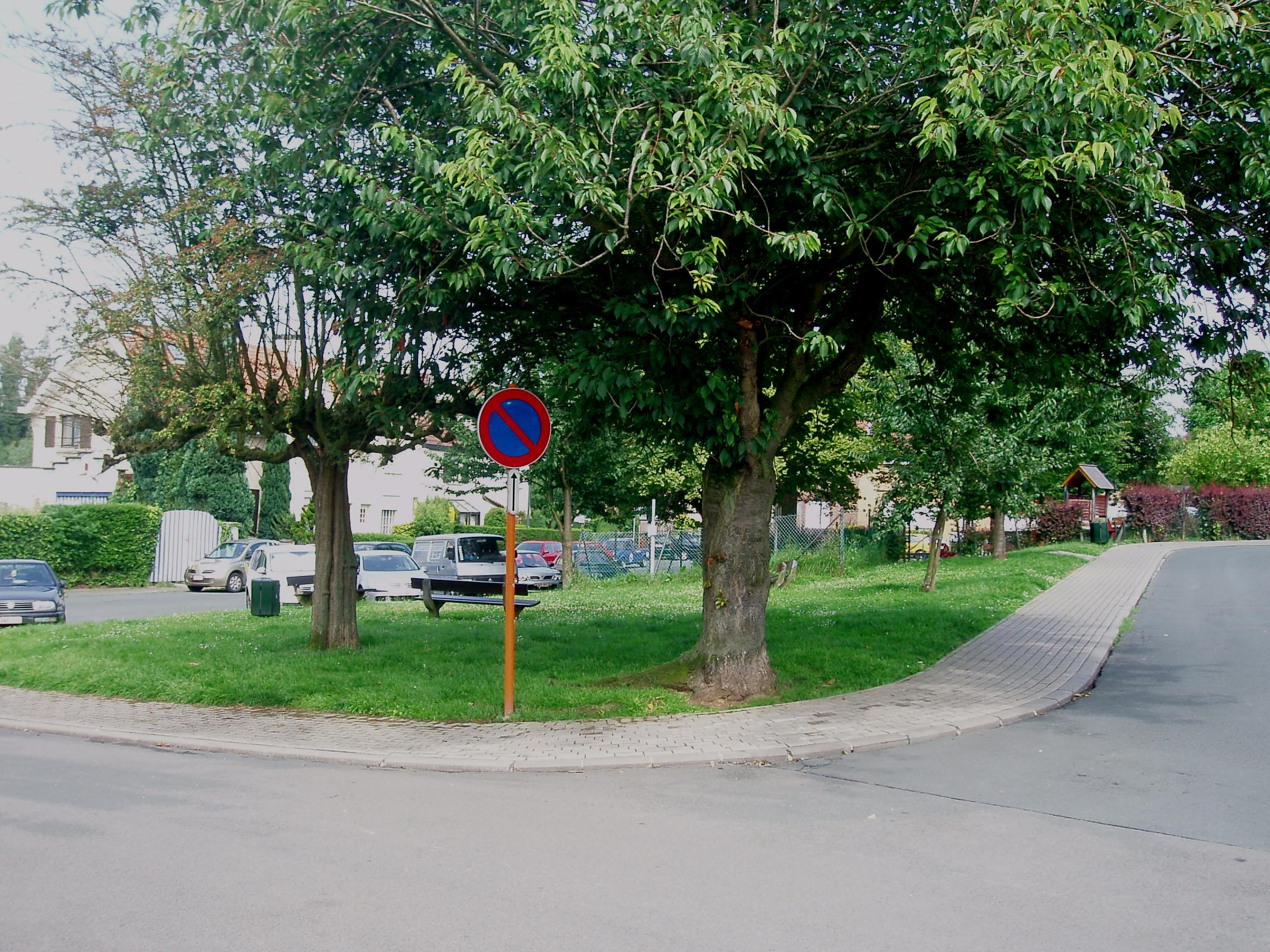 square Antoine Vanlindt Auderghem Belgium